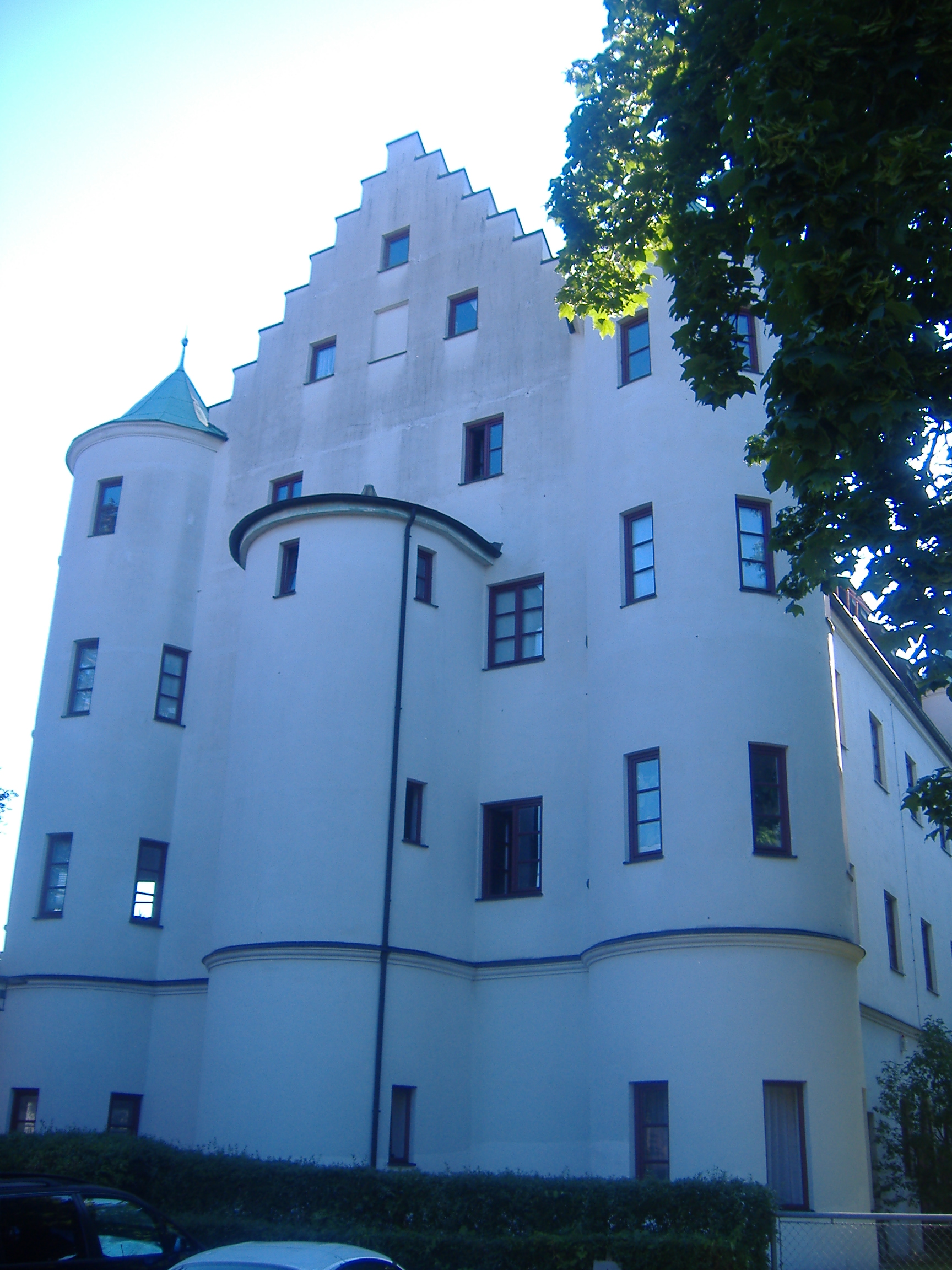 Westseite Schloss Pfersee